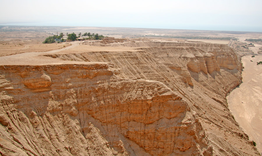 Qumeran site and environs